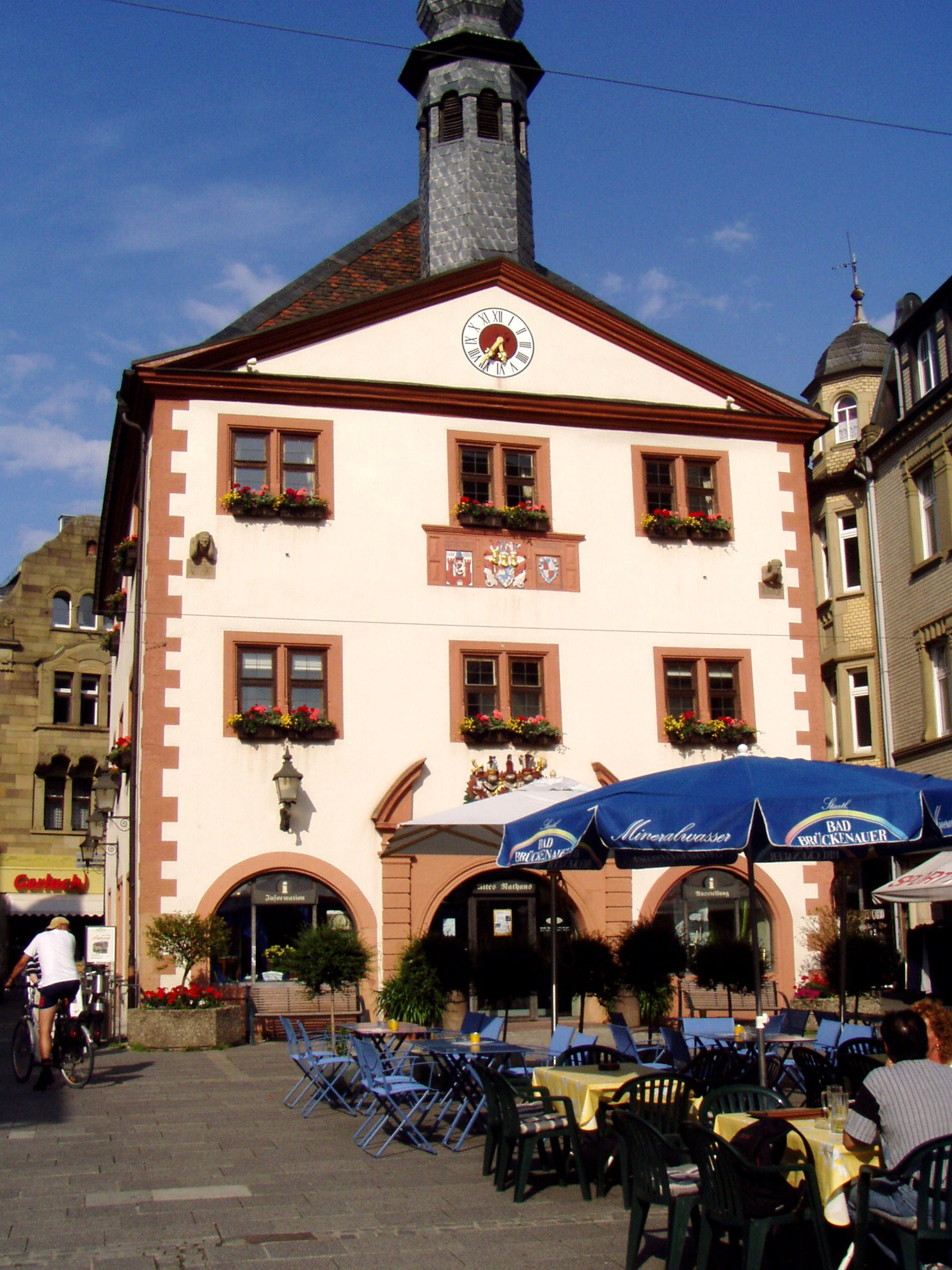 Old Townhall (Altes Rathaus) in Bad Kissingen